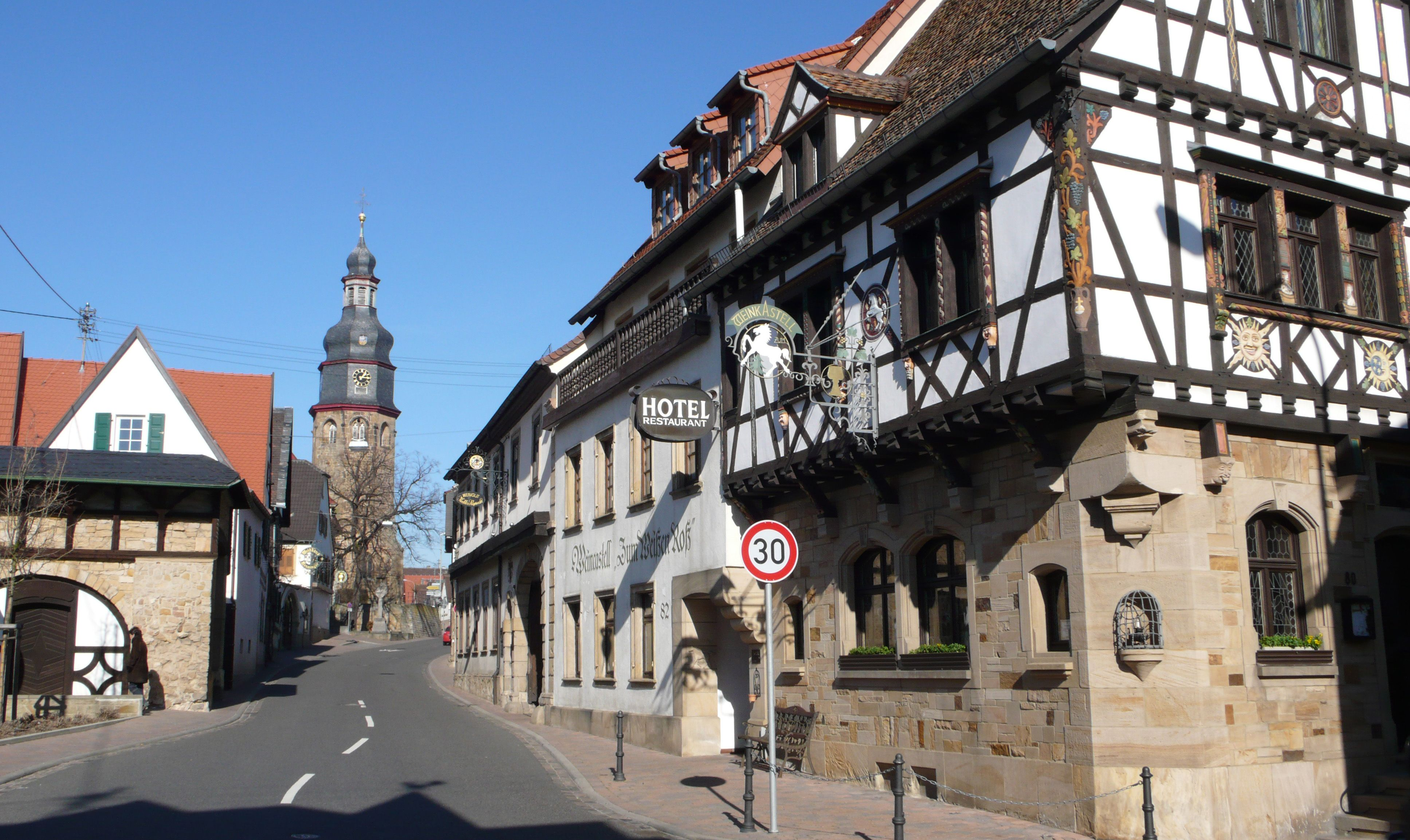 Kallstadt, Weinstrasse; Weinstraße 80/82: Gasthaus „Weinkastell“; im Hintergrund Weinstraße 107: Protestantische Pfarrkirche